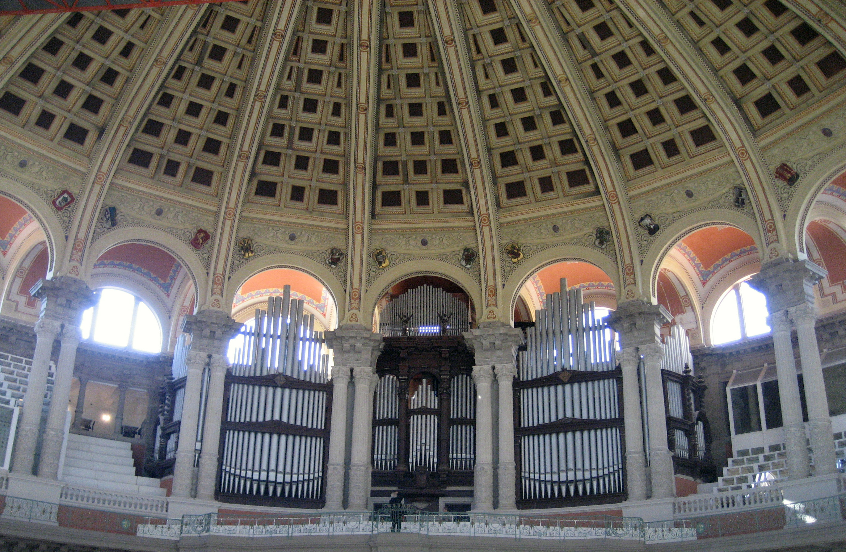 Órgano del Gran Salón en el Palacio Nacional de Barcelona, Cataluña. Spain